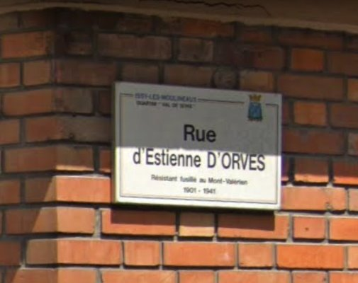 On a dû croire à un moment que le prénom de M. D’Orves était Estienne, et l’erreur n’a pas été corrigée jusqu’à la fabrication des panneaux.